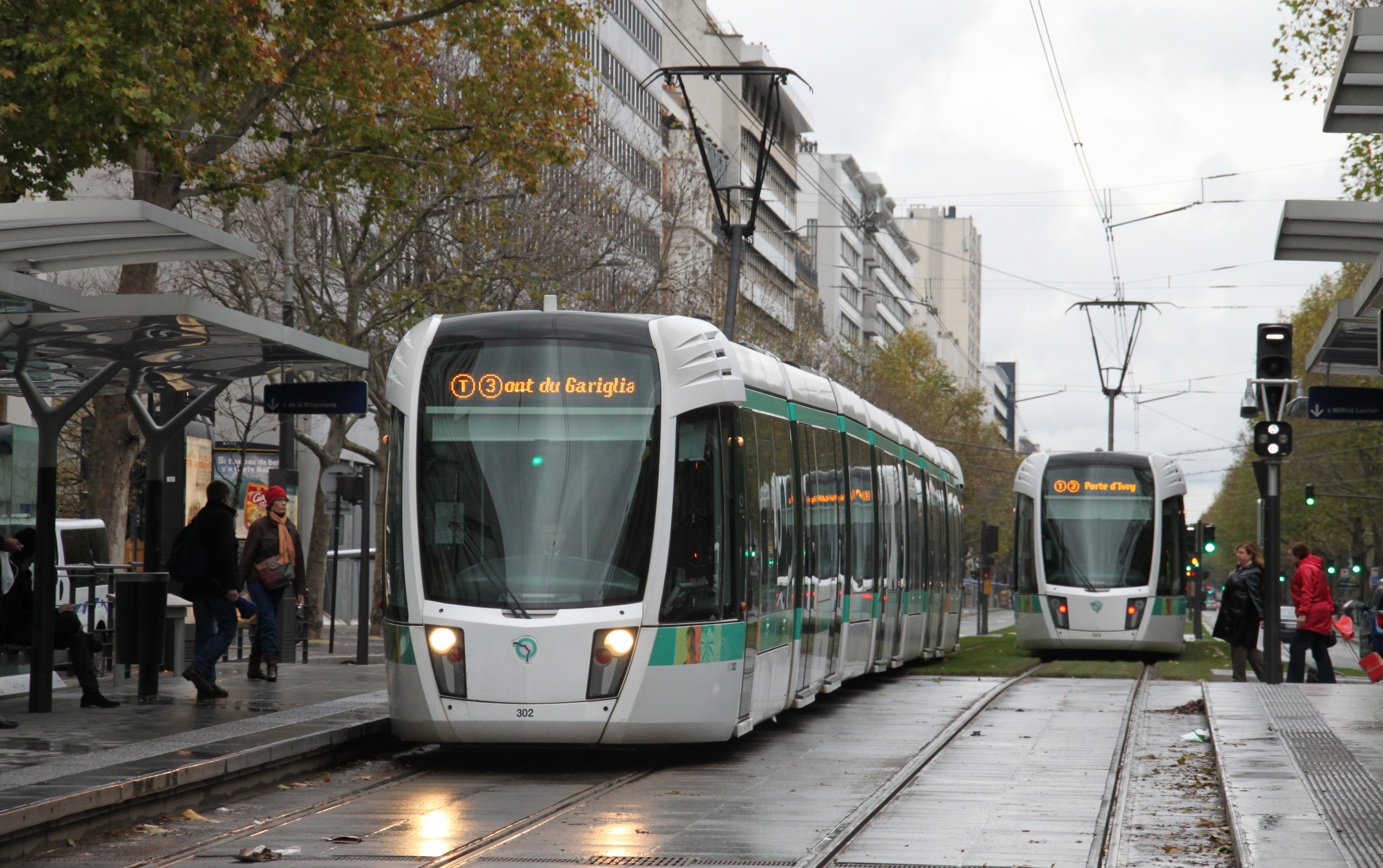 Een Citadis 402 van de Parijse tramlijn T3 bij Porte de Vanves.